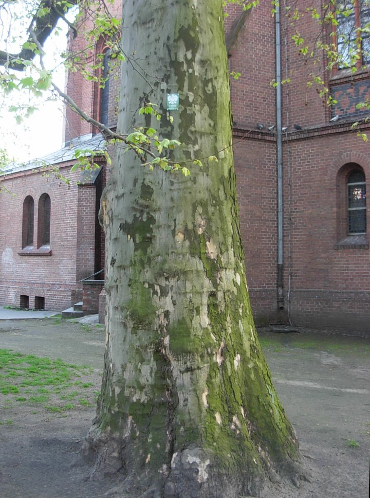 Platan - pomnik przyrody o obwodzie 300 cm na placu Wolności w Bydgoszczy